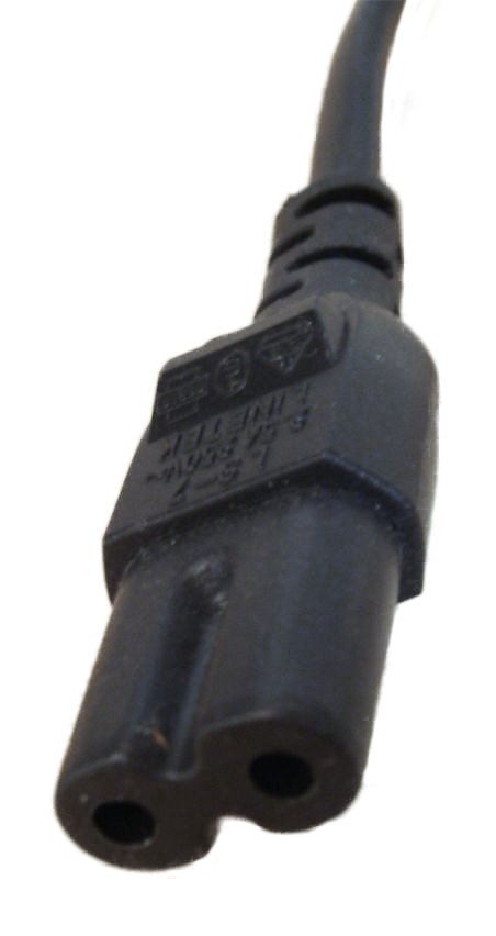 Connector IEC-60320-C7 (Kleingerätestecker nach IEC-60320-C7)